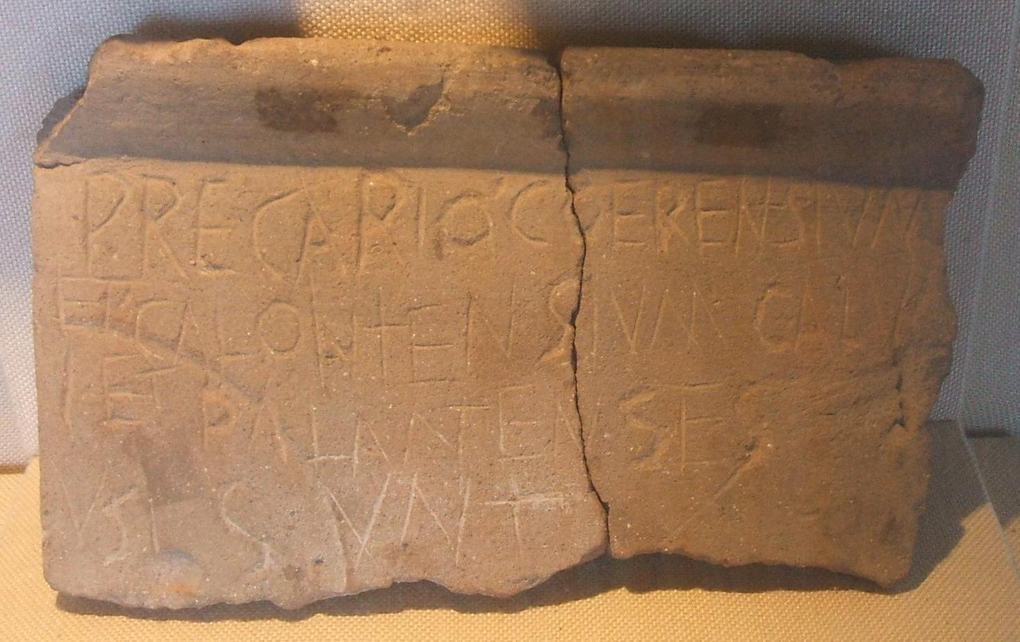 Una tégula romana escrita apareció en la zona de Garrovillas de Alconétar (Cáceres), según Álvarez Vecencio. Ingresó por donación en el Museo Arqueológico Nacional (Madrid) el año 1918. Ahora se conserva, probablemente como depósito, en el Museo de Cáceres. Lectura: PRECARIO COERENSIVN/ ET CALONTENSIVM CALUR/ I. ET. PALANTENSES/ VSI SUNT/ Traducción: "Los calures y los palantenses tienen derecho de uso sobre el precario de los coerenses y los calontenses" HEp-13, 00233